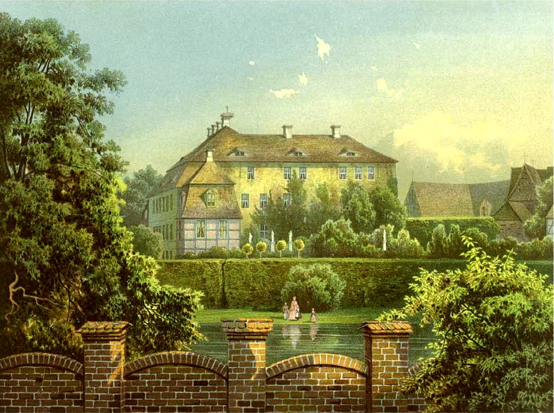 Plattenburg